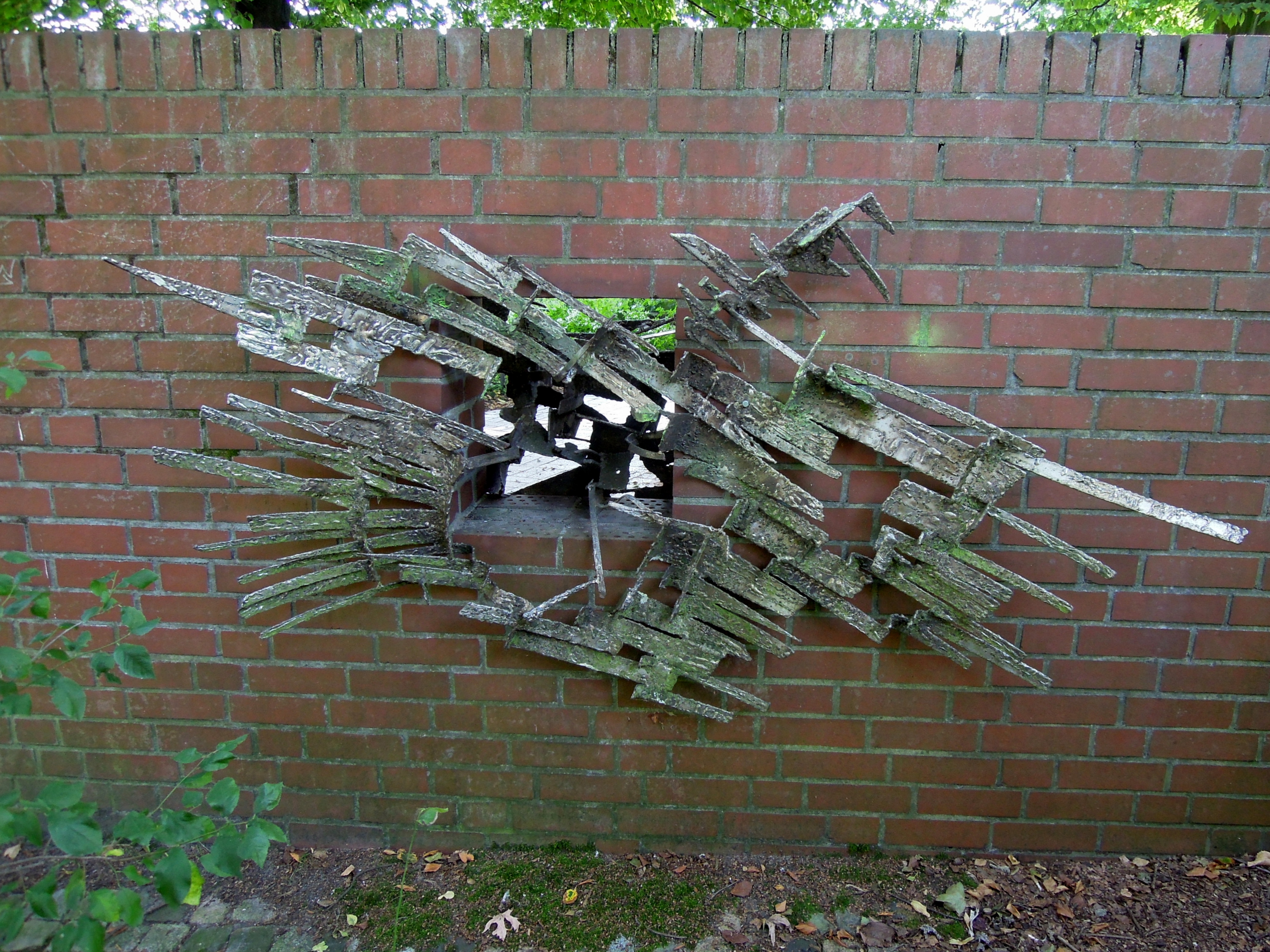 Rückseite der 2-teiligen Skulptur "Wand-Lung Hamburg" von Friederich Werthmann im "Planten un Blomen", Hamburg. Installiert anlässlich der IGA 1963. Die Skulptur befindet sich zu beiden Seiten einer gemauerten, mit einem Durchlass versehenen Wand.